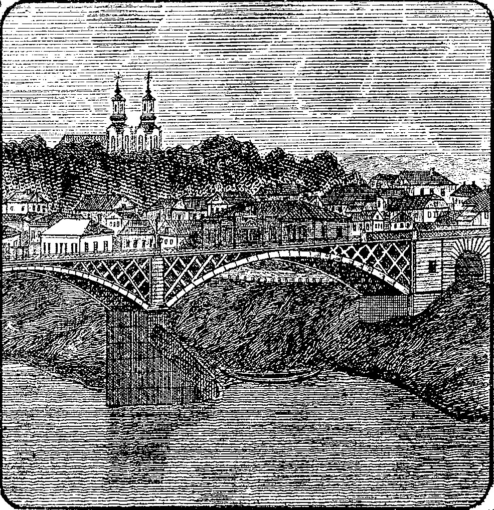 Беларуская (тарашкевіца): Віцебск (Viciebsk), Дзьвінскі мост (Dźvinski most) і прадмесьце Русь (Ruś). Царква Сьвятых Апосталаў Пятра і Паўла